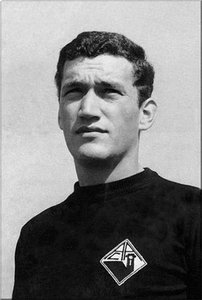 Maior ídolo